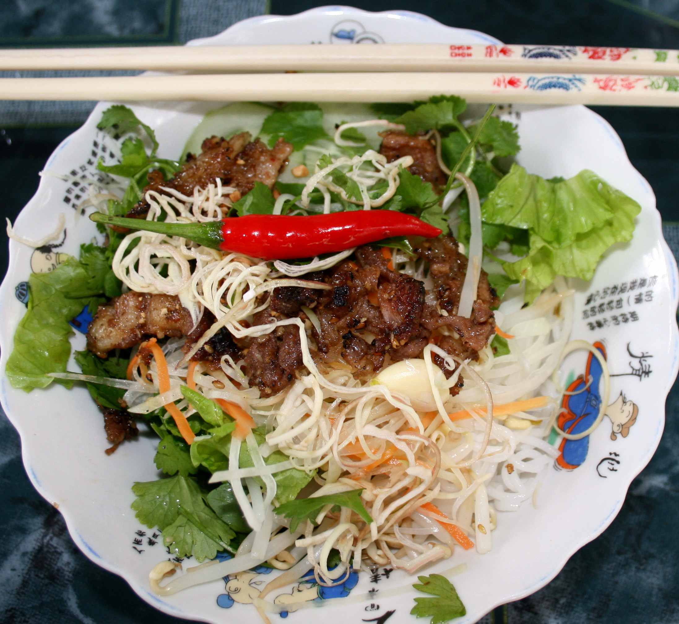 Huế cuisine: "Bún thịt nướng"